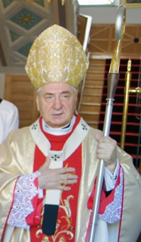 Prymas Polski abp Józef Kowalczyk z wizytą w Seminarium - 2012